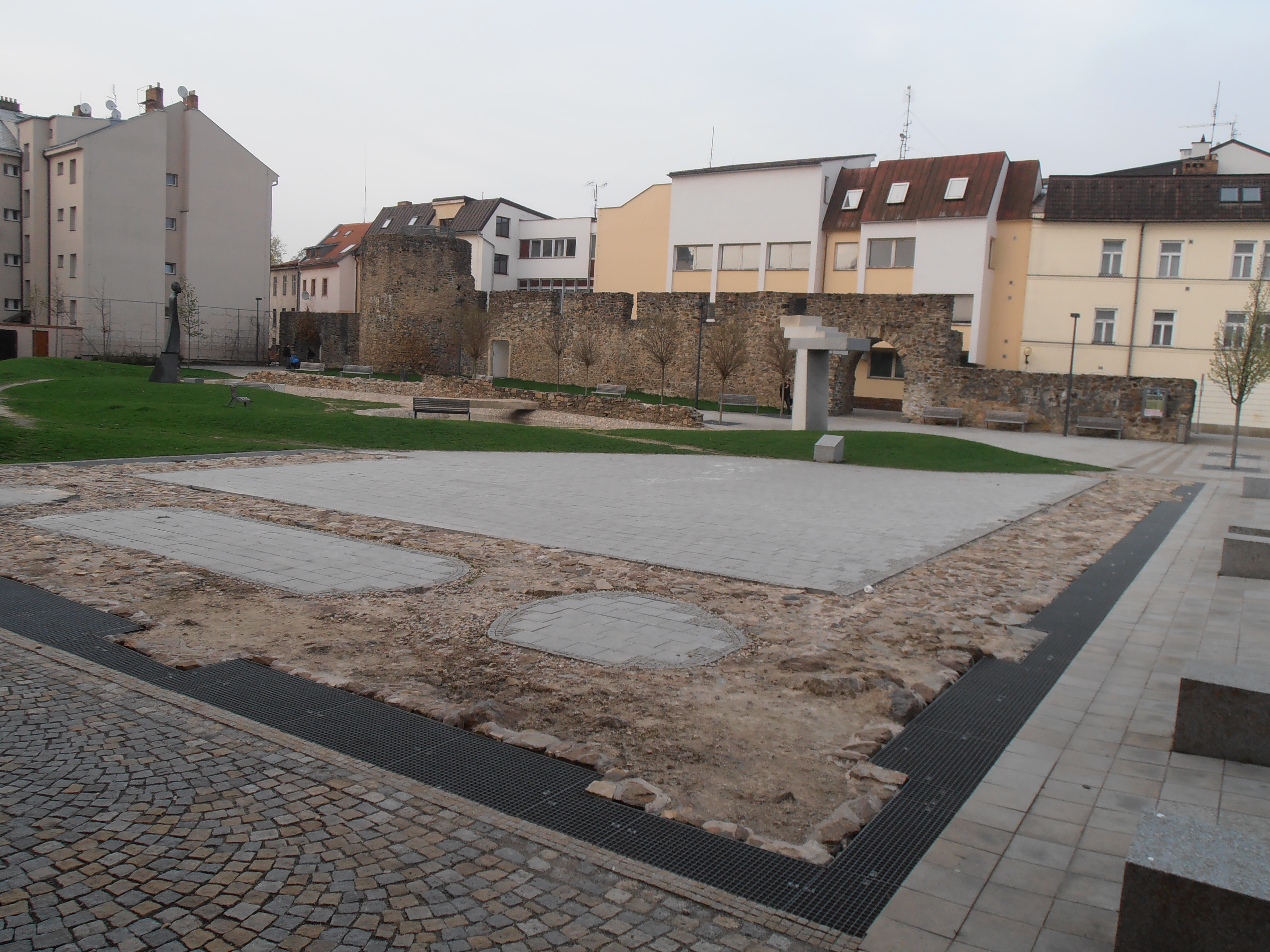 Základy jihlavské synagogy.